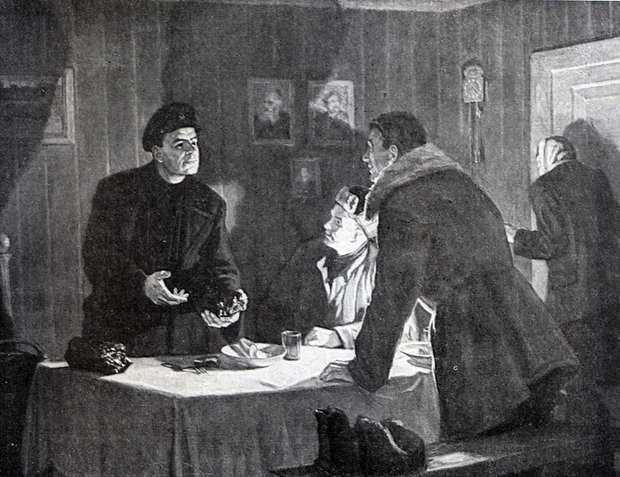 Канстанцін Заслонаў